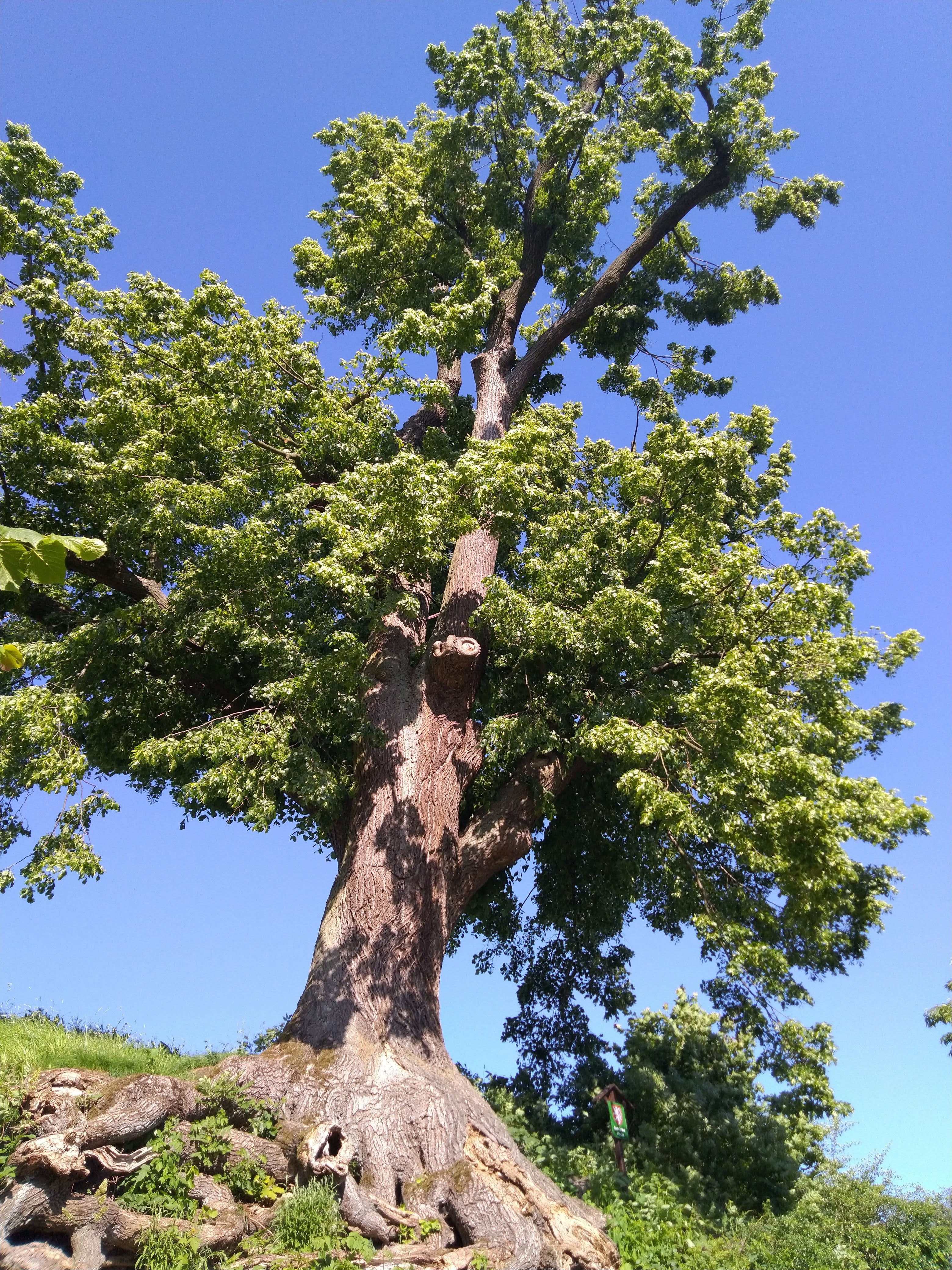 Lípa ve velkém Poříčí (památný strom)